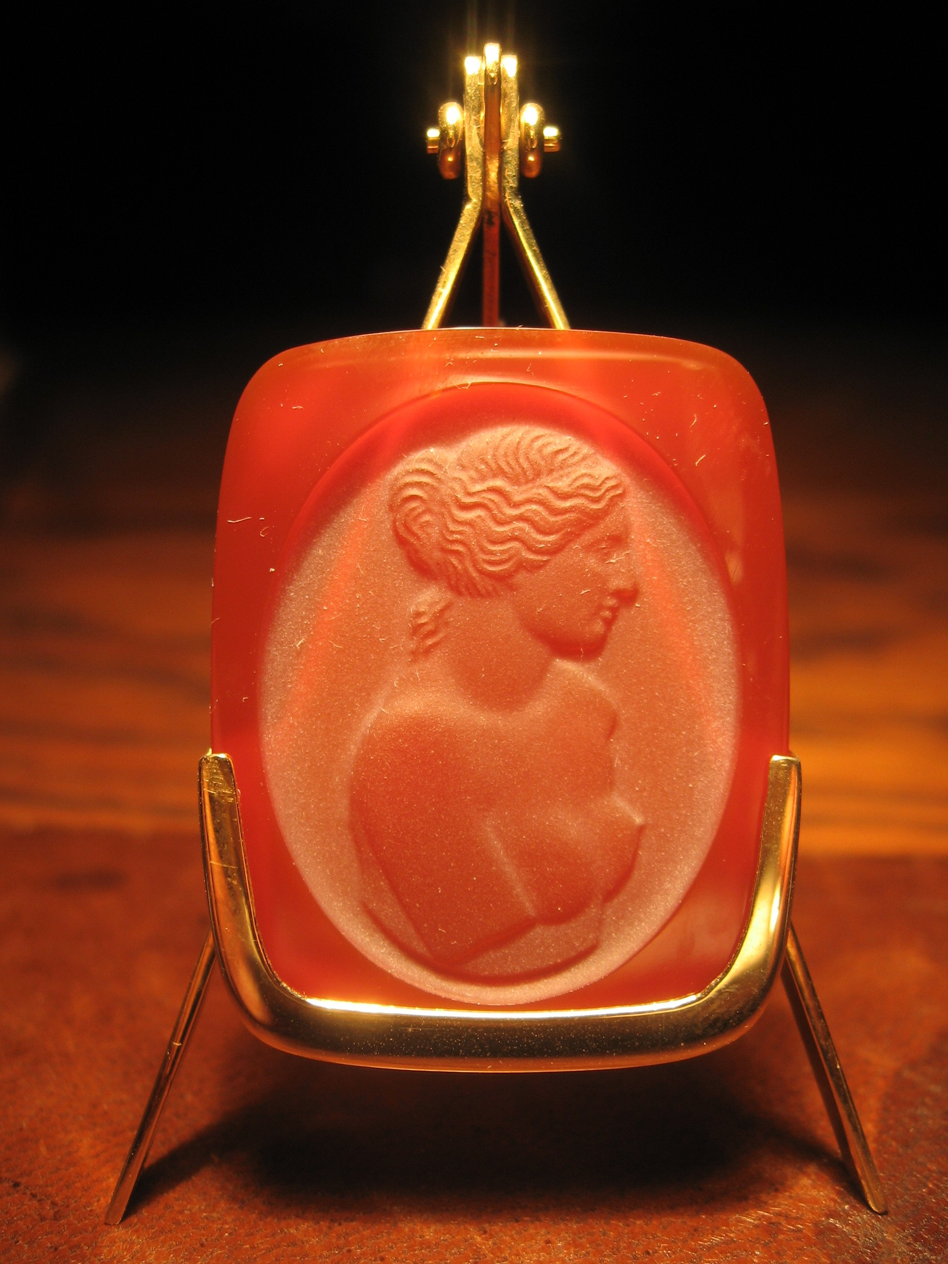 Gemme in Karneol geschnitten auf gold. Ständer